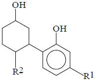 Циклогексилфенолы